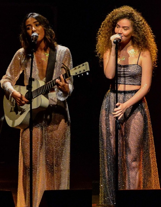 Anavitória